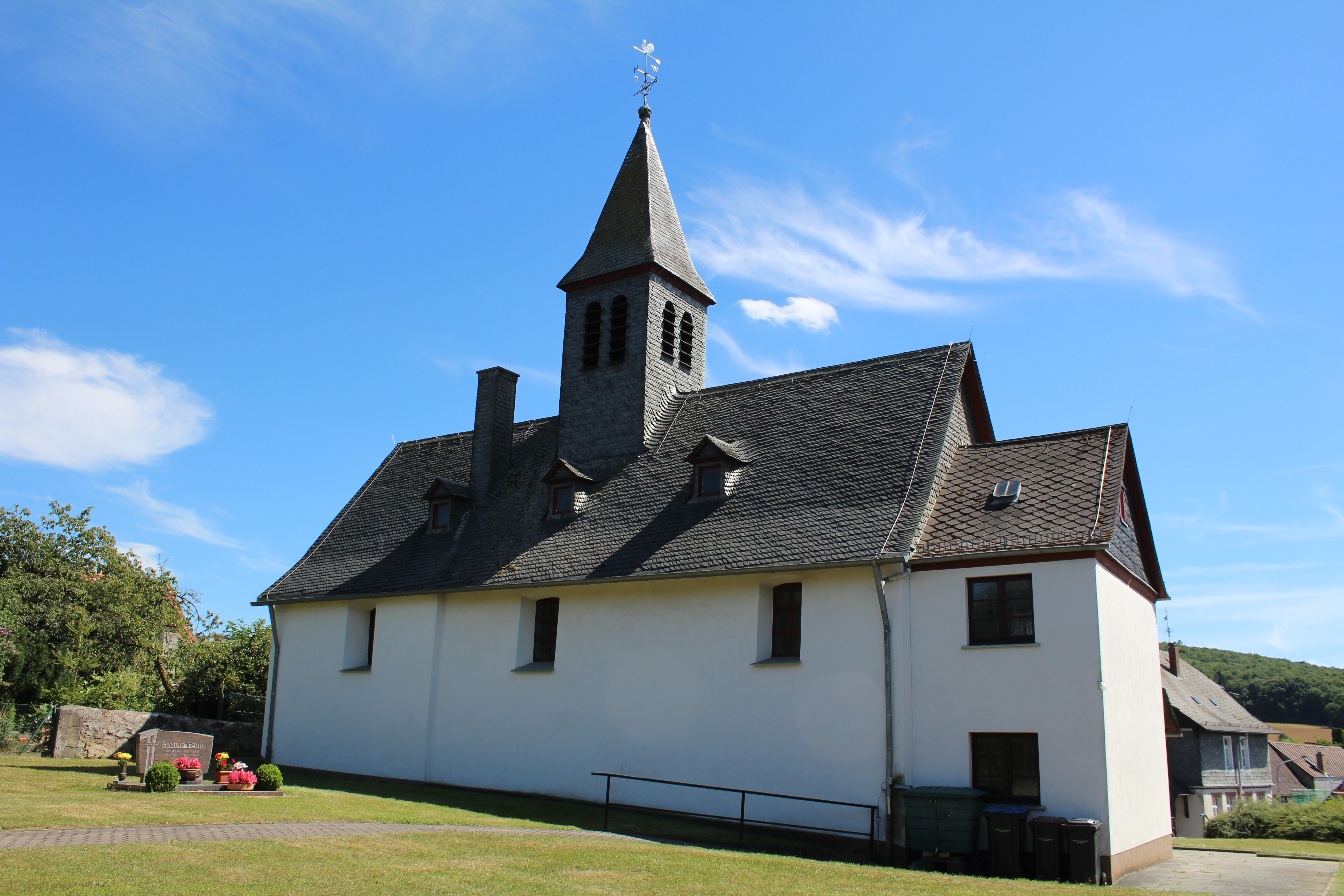 Evangelische Kirche Oberwetz, Gemeinde Schöffengrund, Hessen, Deutschland